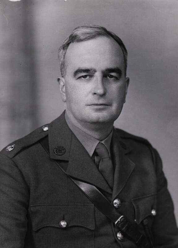 Vyvyan Adams